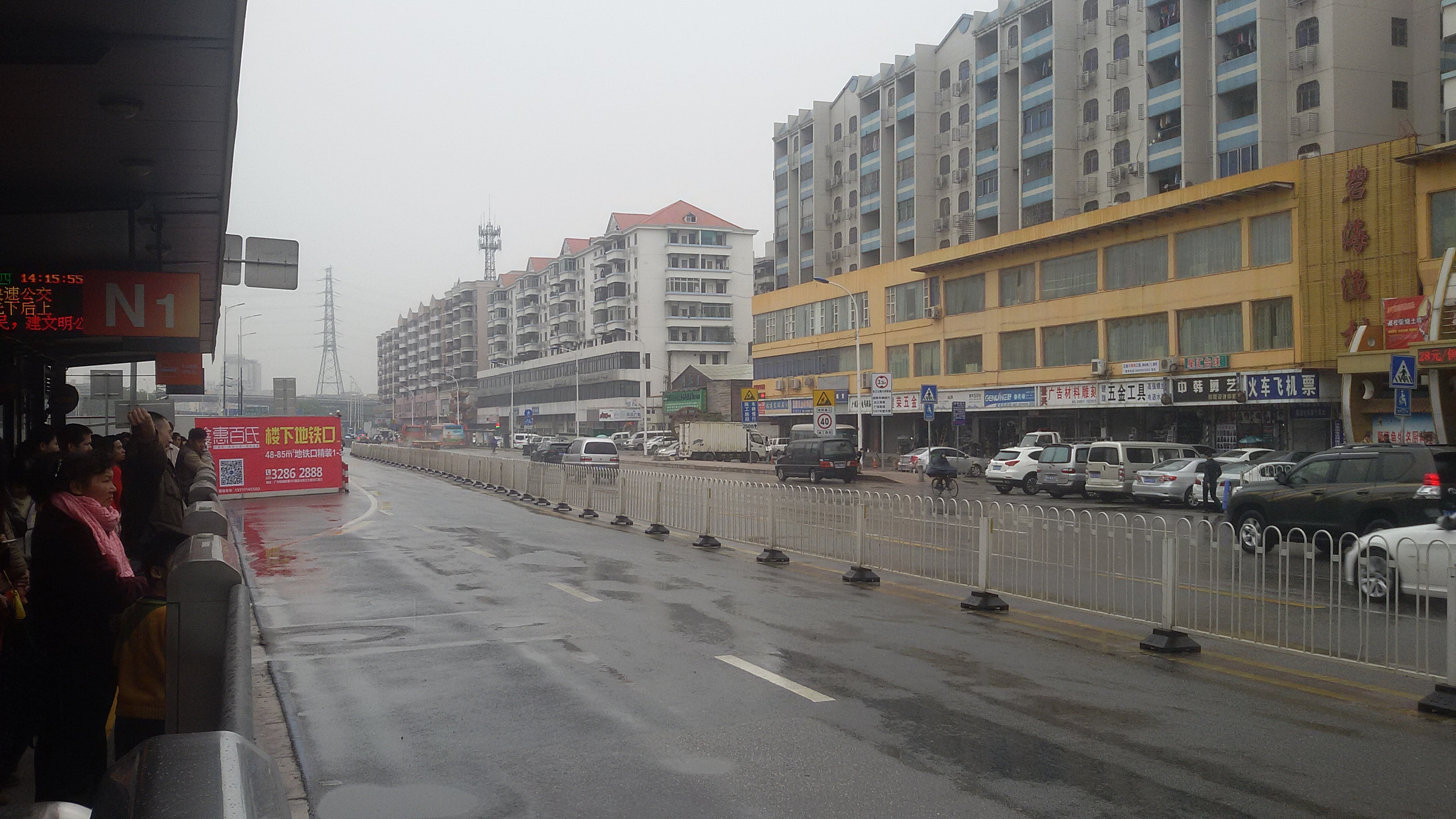 粵語: 黃埔東路夏園BRT站附近